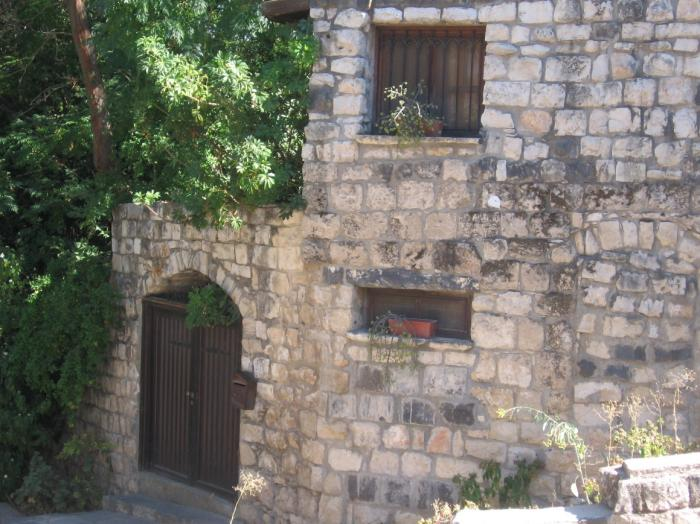 בית פרטי